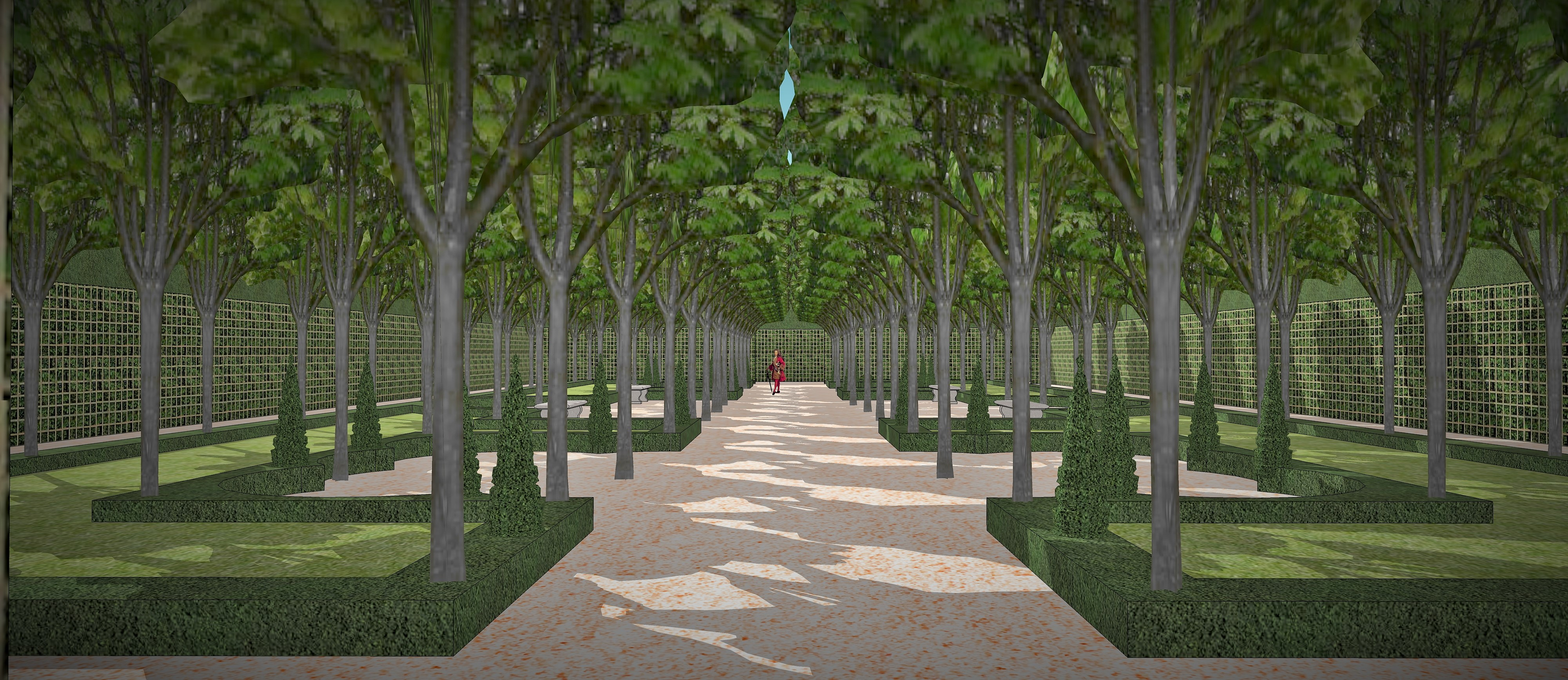 Vue de la salle des marronniers des jardins bas de Meudon